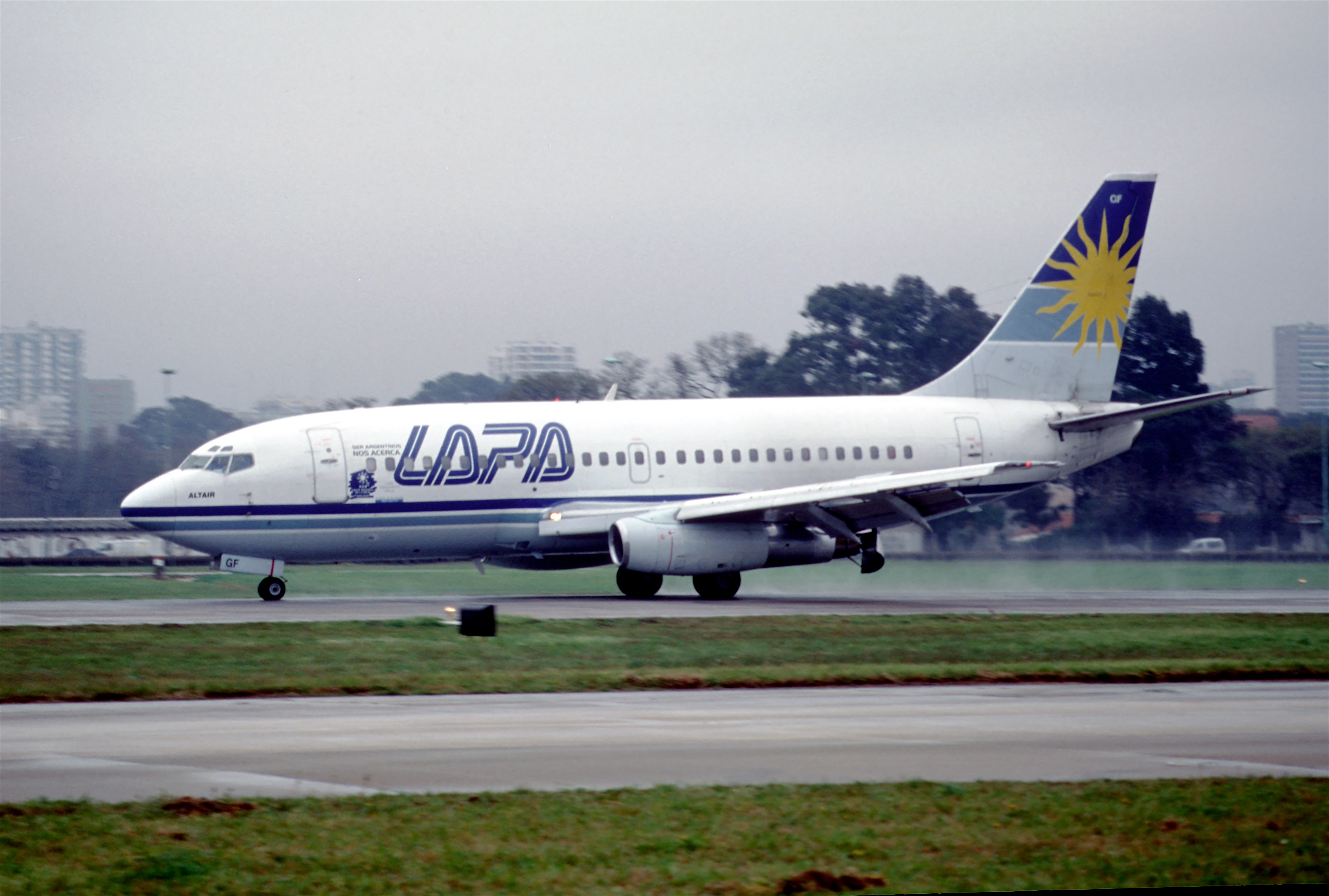 106ae - LAPA Boeing 737-2M6; LV-VGF@AEP;22.08.2000